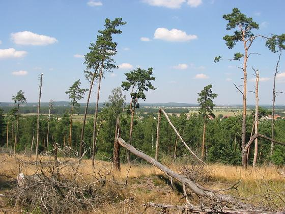 Afbeelding:Glau Slemphout1.jpg Totholz, Glauer Berge, Brandenburg Naturpark Nuthe-Nieplitz, Blick über den Thümener Winkel (siehe Stangenhagen), Richtung Saarmund Selbst fotografiert, August 2004 GNU FDL